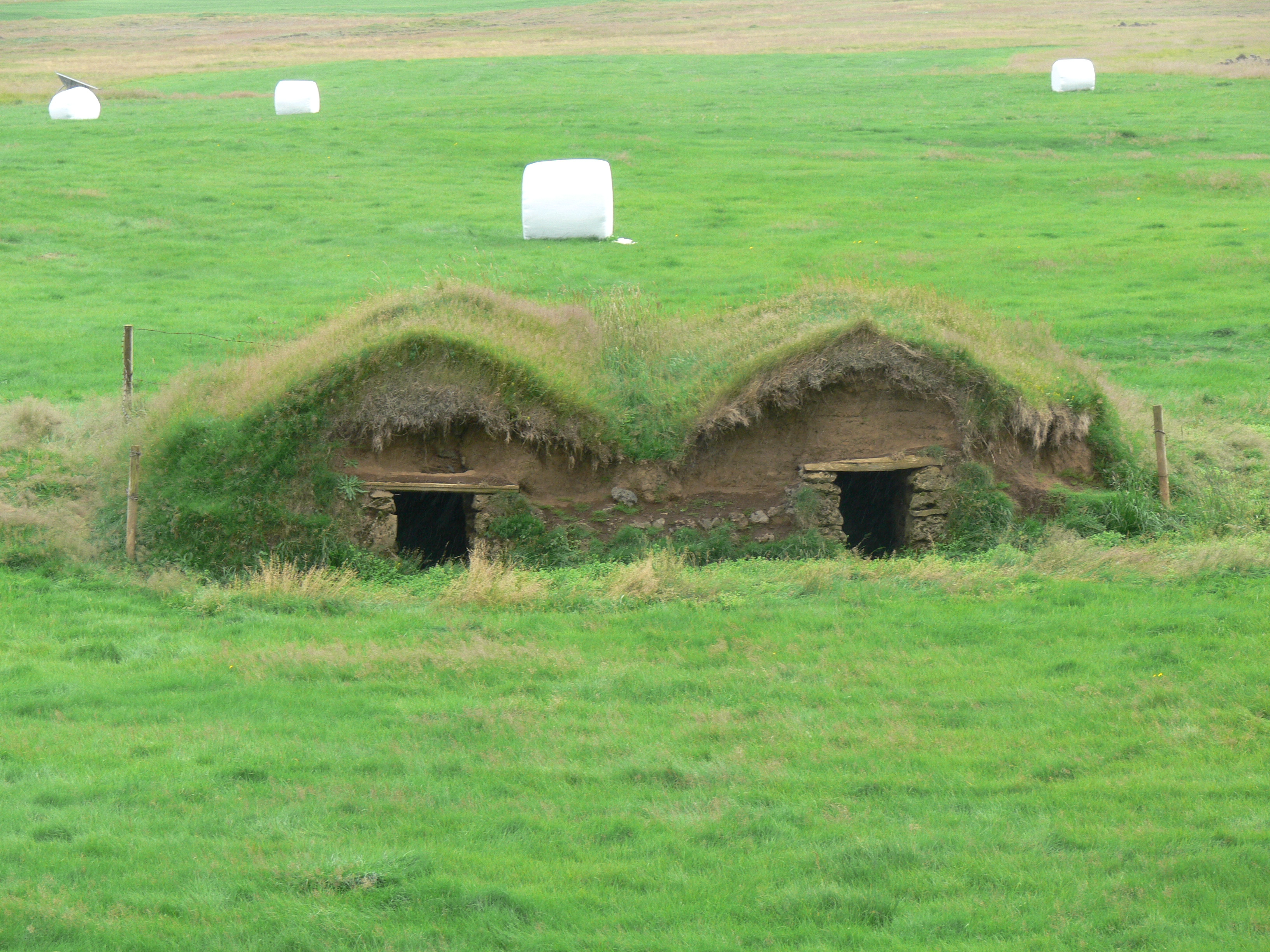 Speisekammern in Keldur